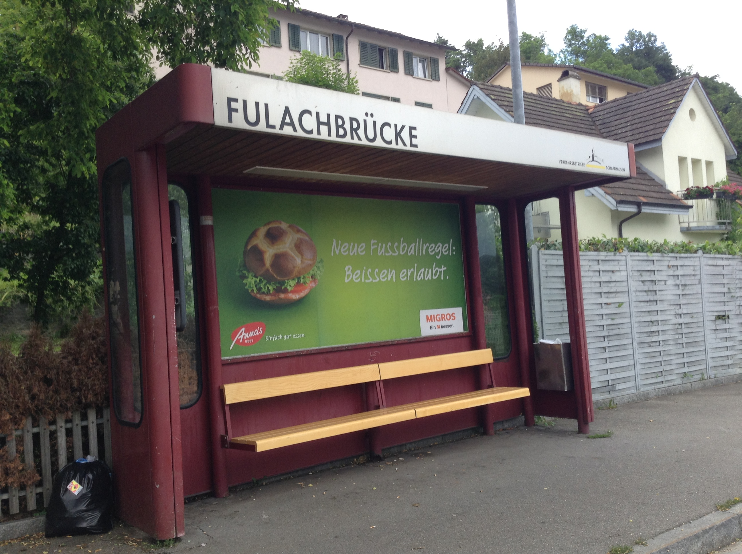 Ein Haltestellenhäuschen der VBSH